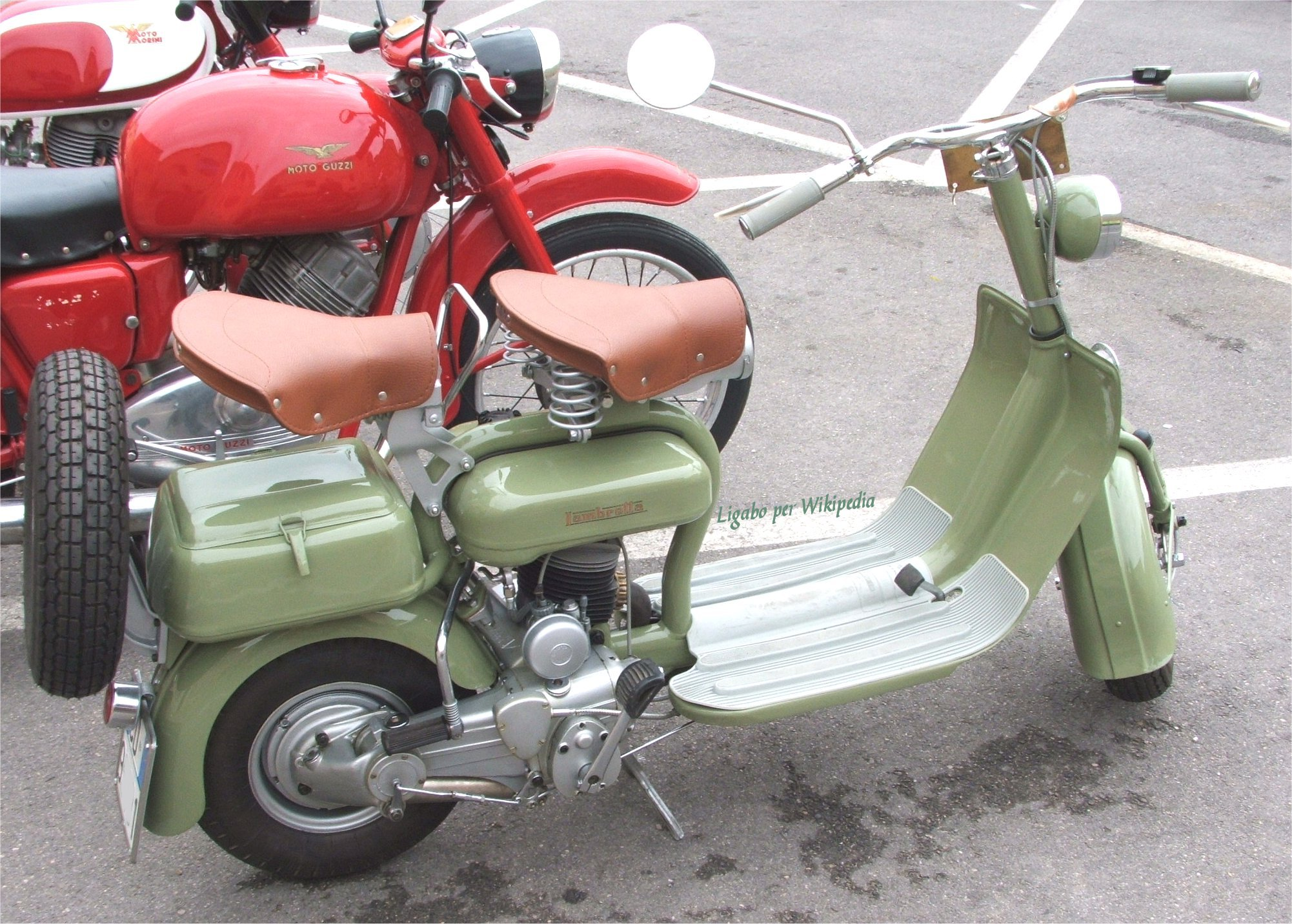 Innocenti Lambretta 125 C del 1951 fotografato al Raduno Moto Storiche di Medole nel 2007